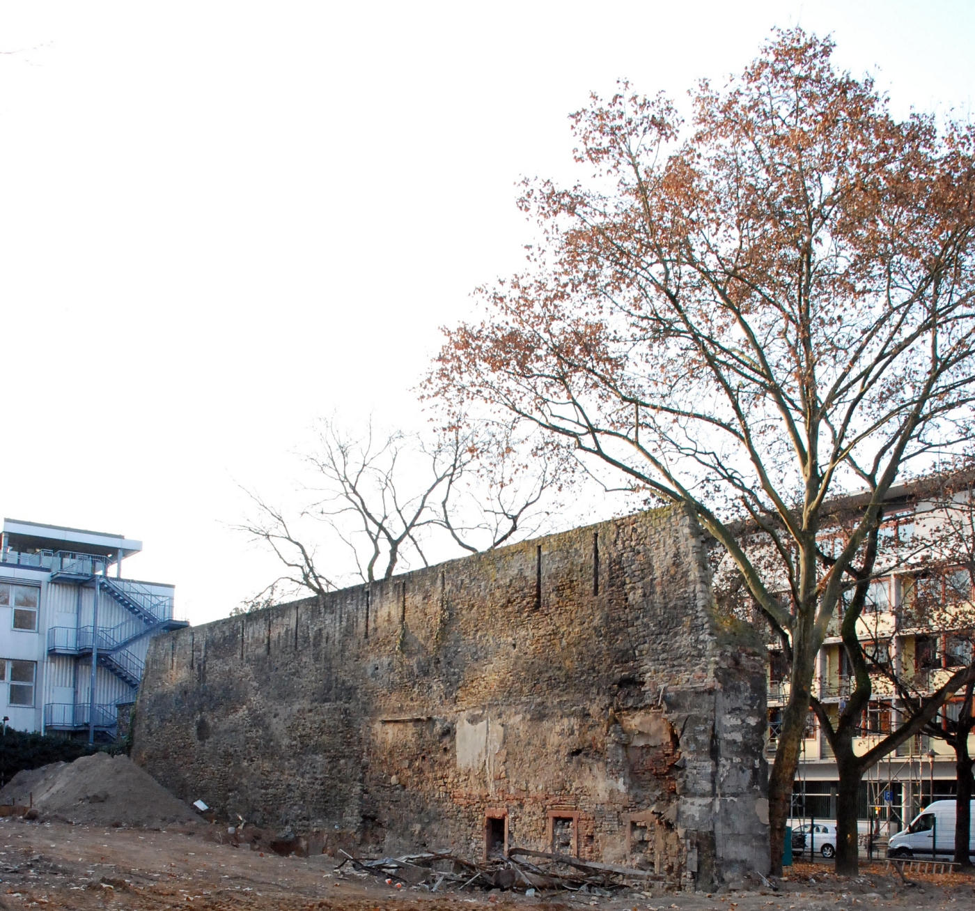 Mainzer Stadtmauer, Blickrichtung von der Rheinstraße Richtung Holzstraße